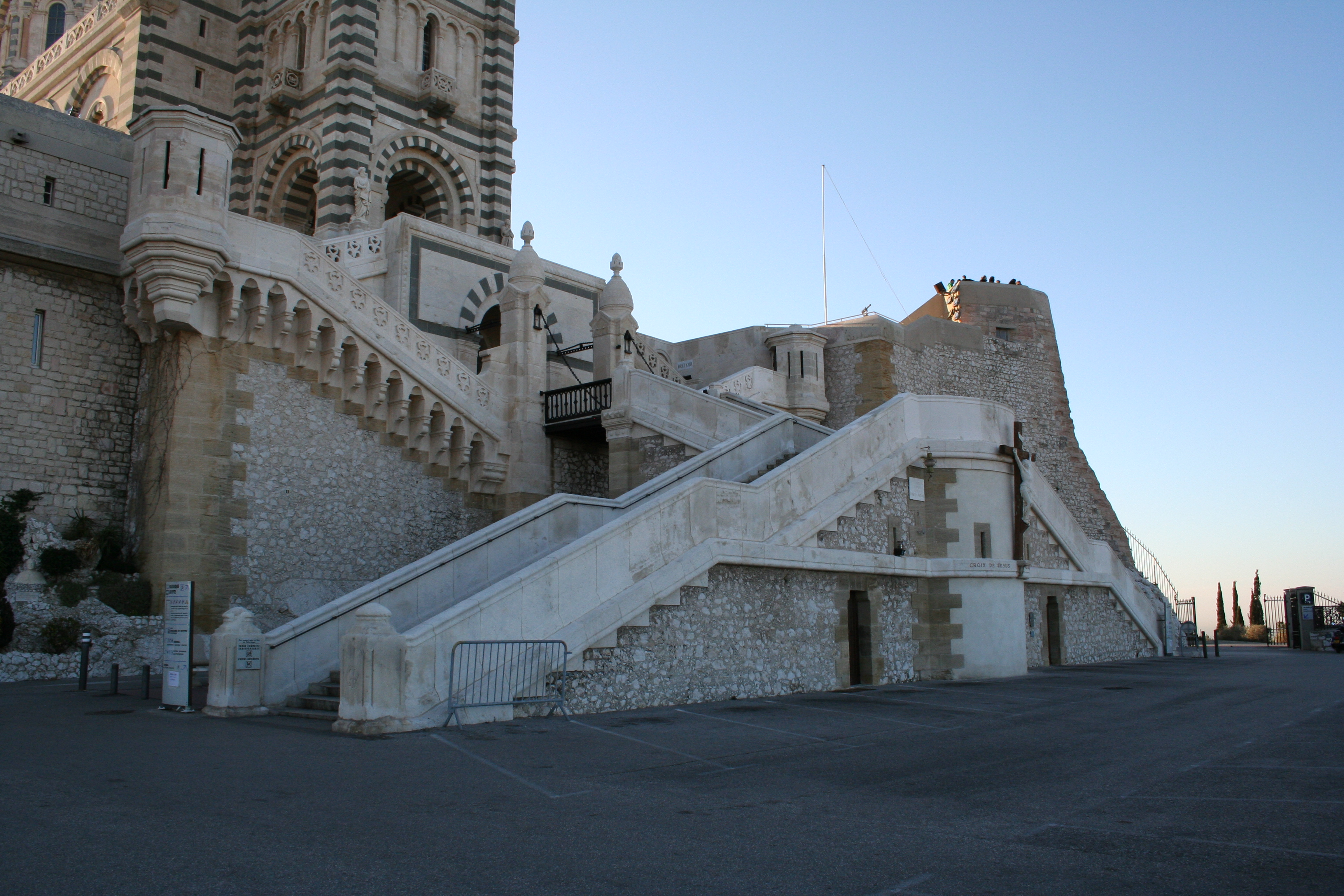 Pont-levis de Notre-Dame de la Garde à Marseille